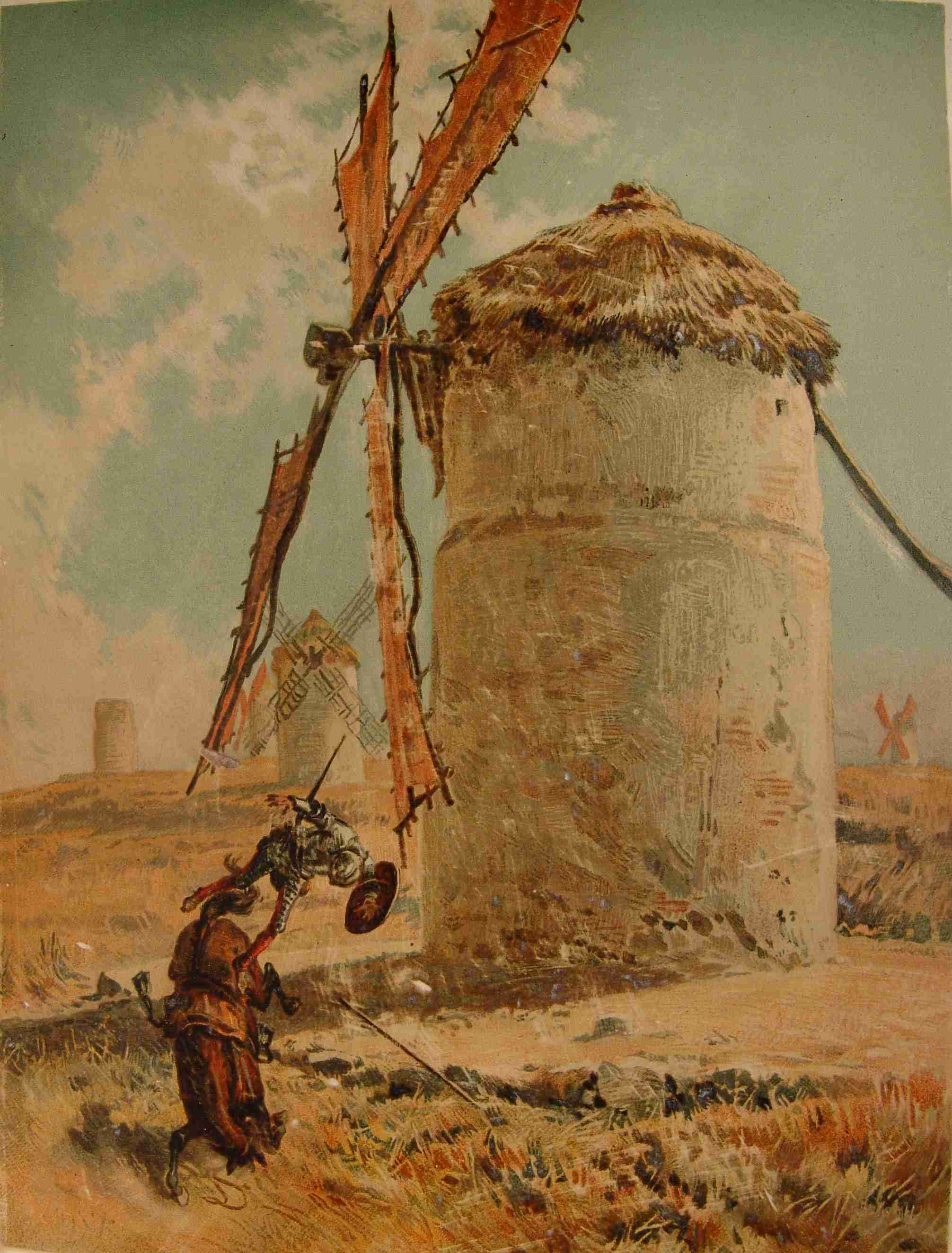 Don Quixote